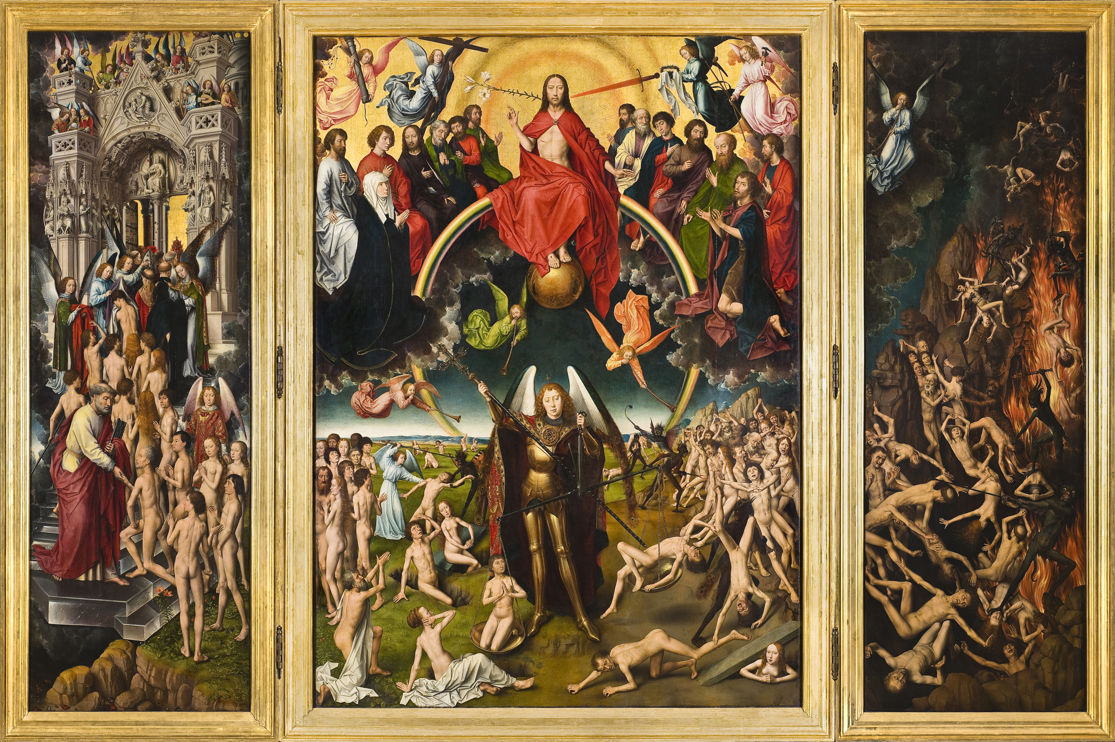 Triptych